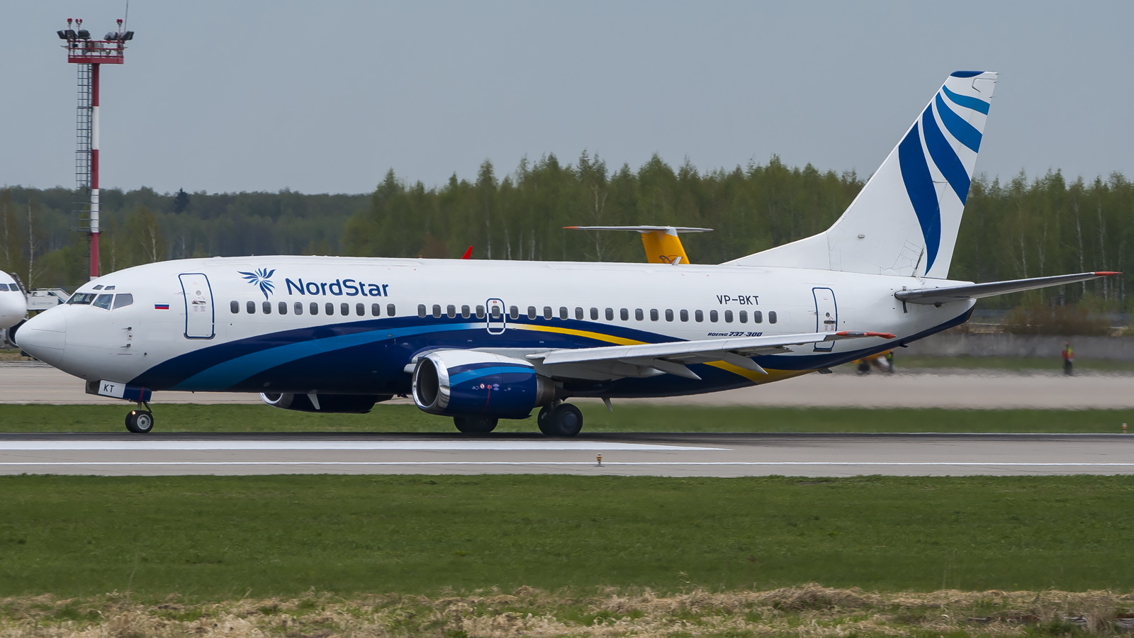 VP-BKT Boeing 737-300 NordStar DME | UUDD